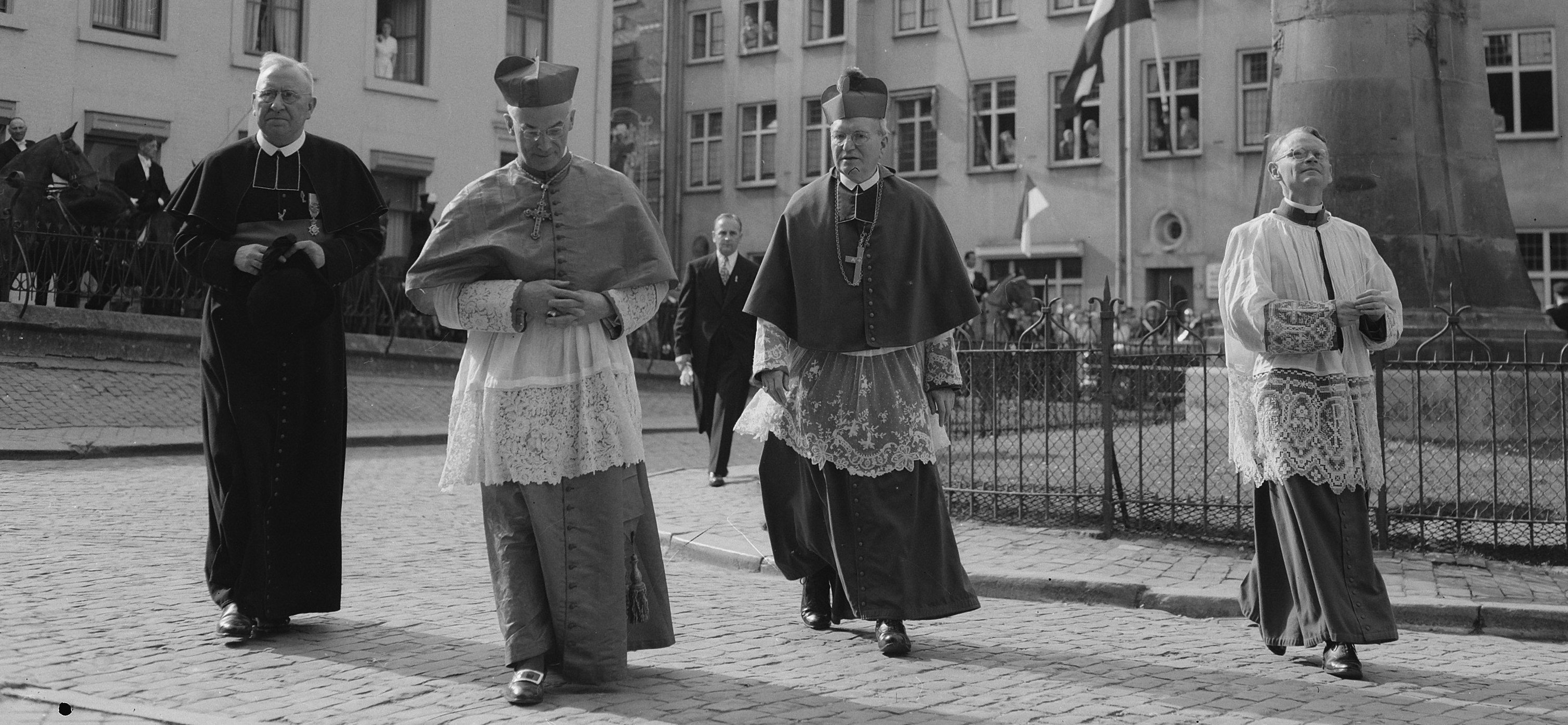 Collectie / Archief : Fotocollectie Anefo Reportage / Serie : [ onbekend ] Beschrijving : Heiligdomsvaart Maastricht. Links Mgr. Frings, aartsbisschop van Keulen rechts Mgr. Dr. J. H. G. Lemmens, bisschop van Roermond Datum : 9 juli 1955 Locatie : Maastricht Trefwoorden : bisschoppen, geestelijken, kardinalen Persoonsnaam : Frings, Lemmens, J.H.G. Fotograaf : Pot, Harry / Anefo Auteursrechthebbende : Nationaal Archief Materiaalsoort : Negatief (zwart/wit) Nummer archiefinventaris : bekijk toegang 2.24.01.04 Bestanddeelnummer : 907-2272 Reacties Geplaatst door Ingrid M.H. Evers op 19 november 2007 - 02:57. Locatie: 'voorhof' van de Sint-Servaaskerk bij het Keizer Karelplein. De geestelijken lopen naar de Lange Gang, sinds lang de hoofdingang van de kerk. Achter hen het H. Hartbeeld dat u al weer vele jaren op de Algemene Begraafplaats staat.